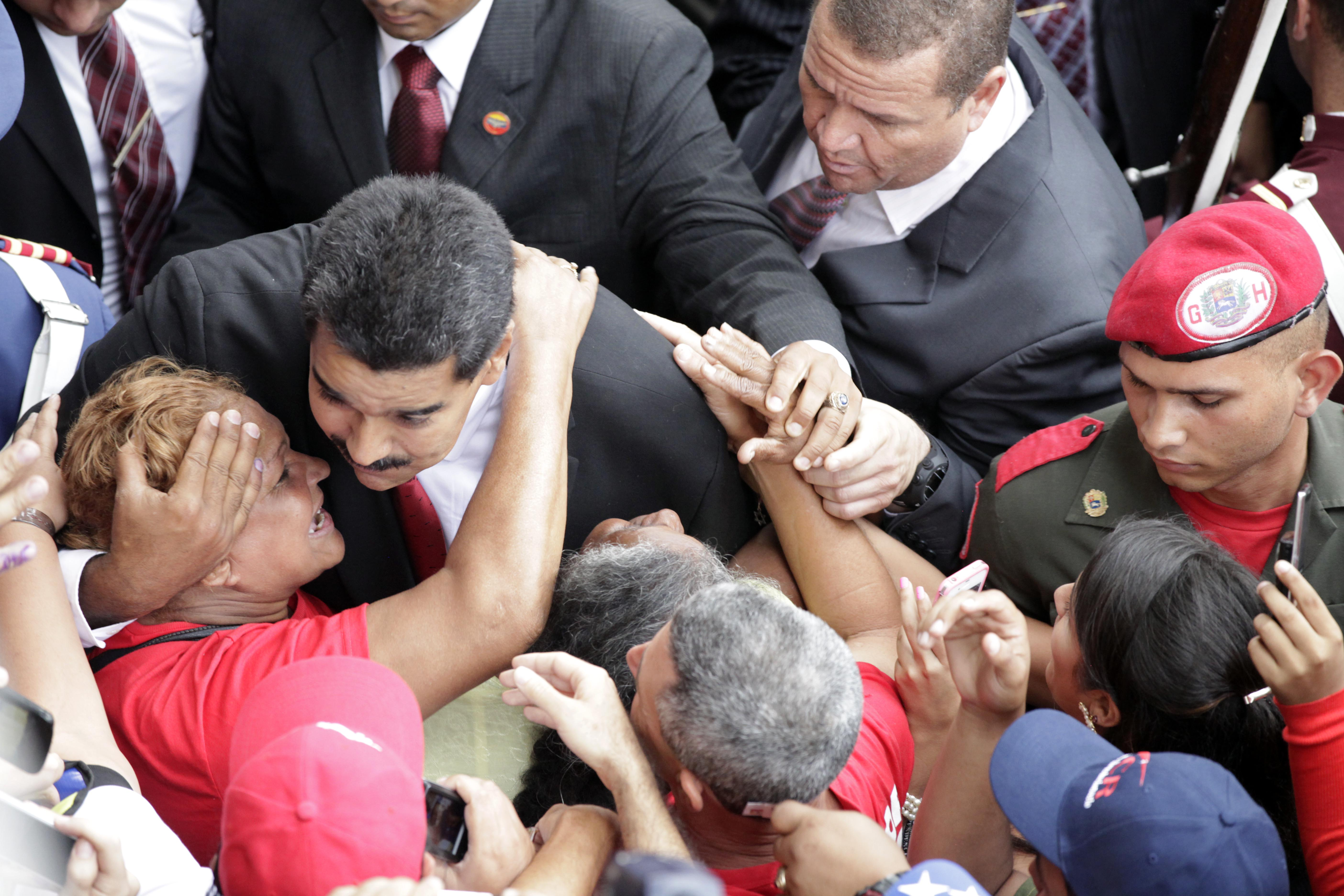 Caracas (Venezuela), 19 Abril del 2013. Posesión de Nicolas Maduro como Presidente de la República Bolivariana de Venezuela. Foto: Xavier Granja Cedeño/Ministerio de Relaciones Exteriores Comercio e Integración